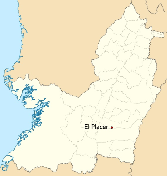 Ubicación de El Placer en el Valle del Cauca.